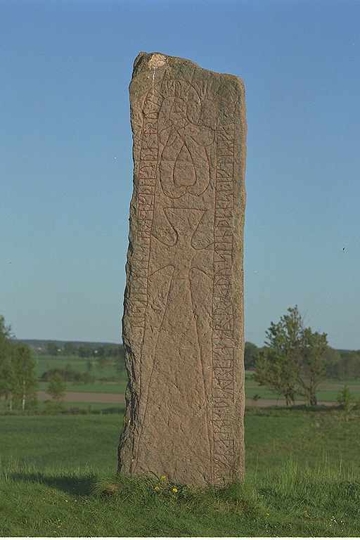 Källby 23:3. Detalj av korset på runstenen Vg55. Inskriften lyder: Ulv och Ragnar, de båda reste denna sten efter Fare, sin fader .. kristen man. Han hade god tro på Gud. Motiv: Vg55 Källbyås Nyckelord: Runor Kategori: Runristning/runsten Källby 23:3. Detalj av korset på runstenen Vg55. Inskriften lyder: Ulv och Ragnar, de båda reste denna sten efter Fare, sin fader .. kristen man. Han hade god tro på Gud.